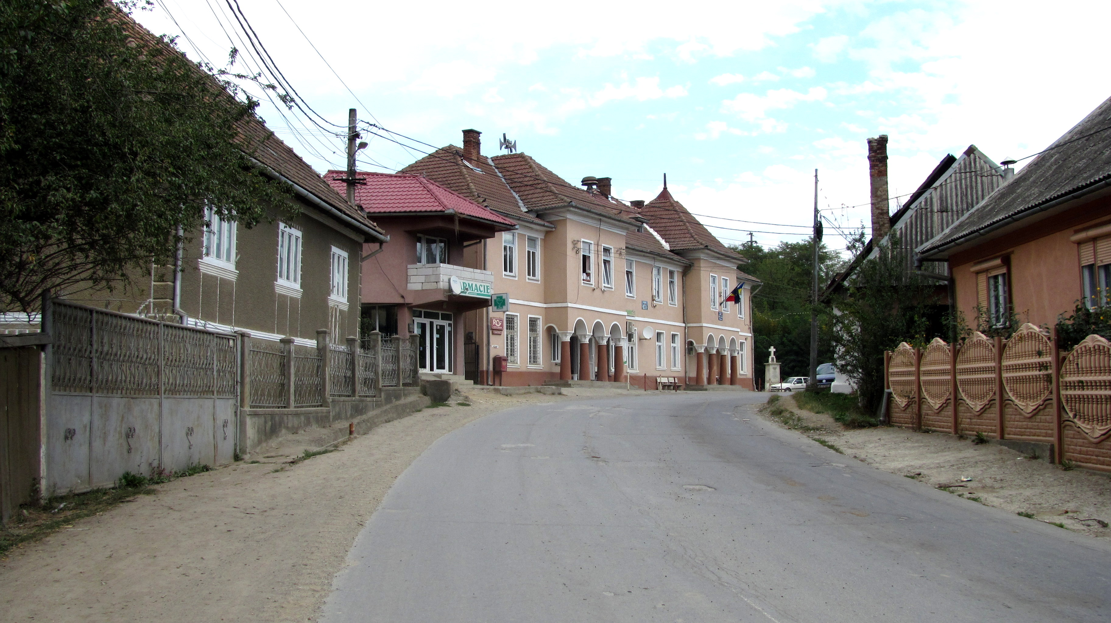 Bistra, Alba - Primăria